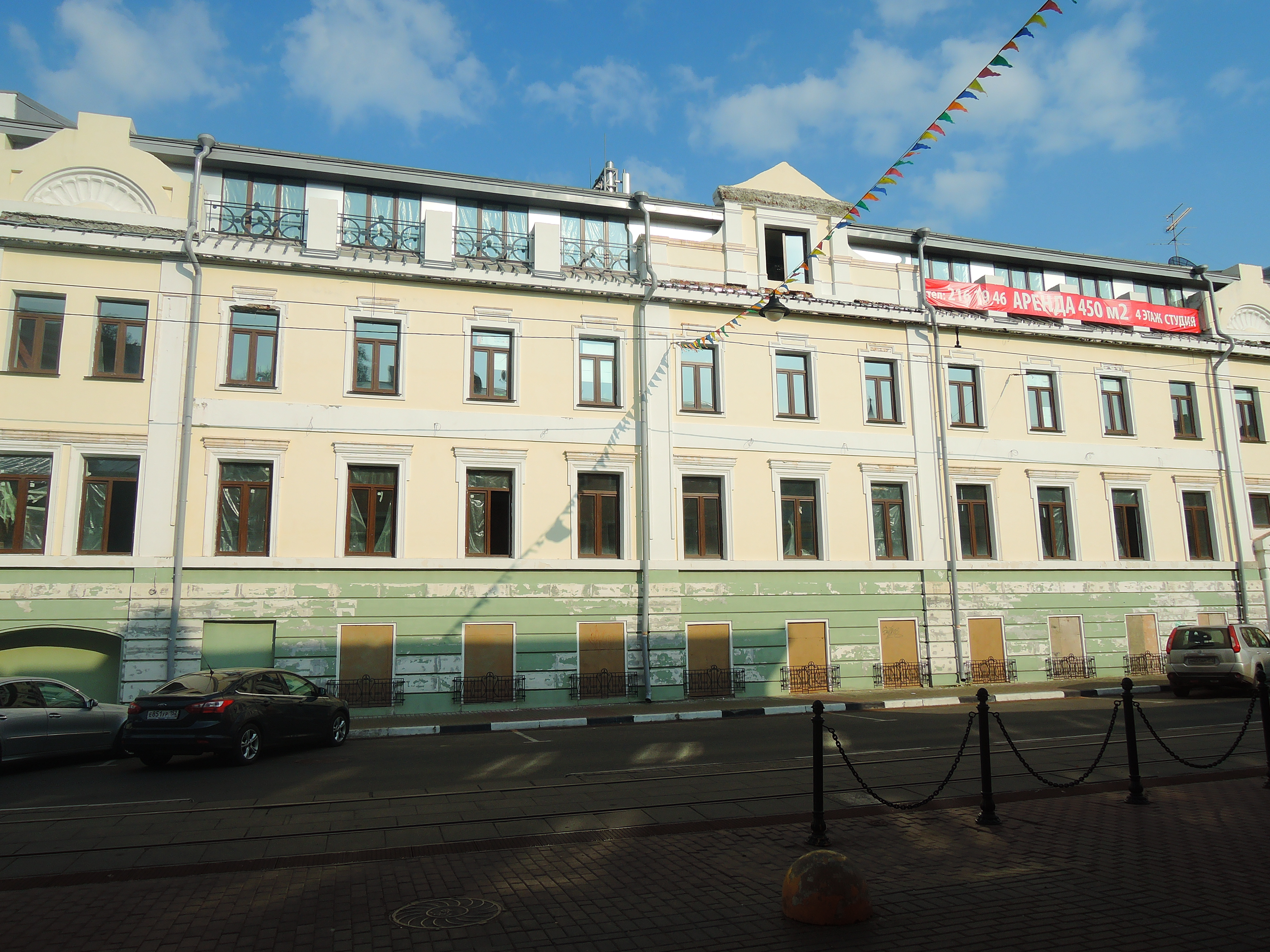 Доходный дом: улица Рождественская, 29, Нижний Новгород, Нижегородская область